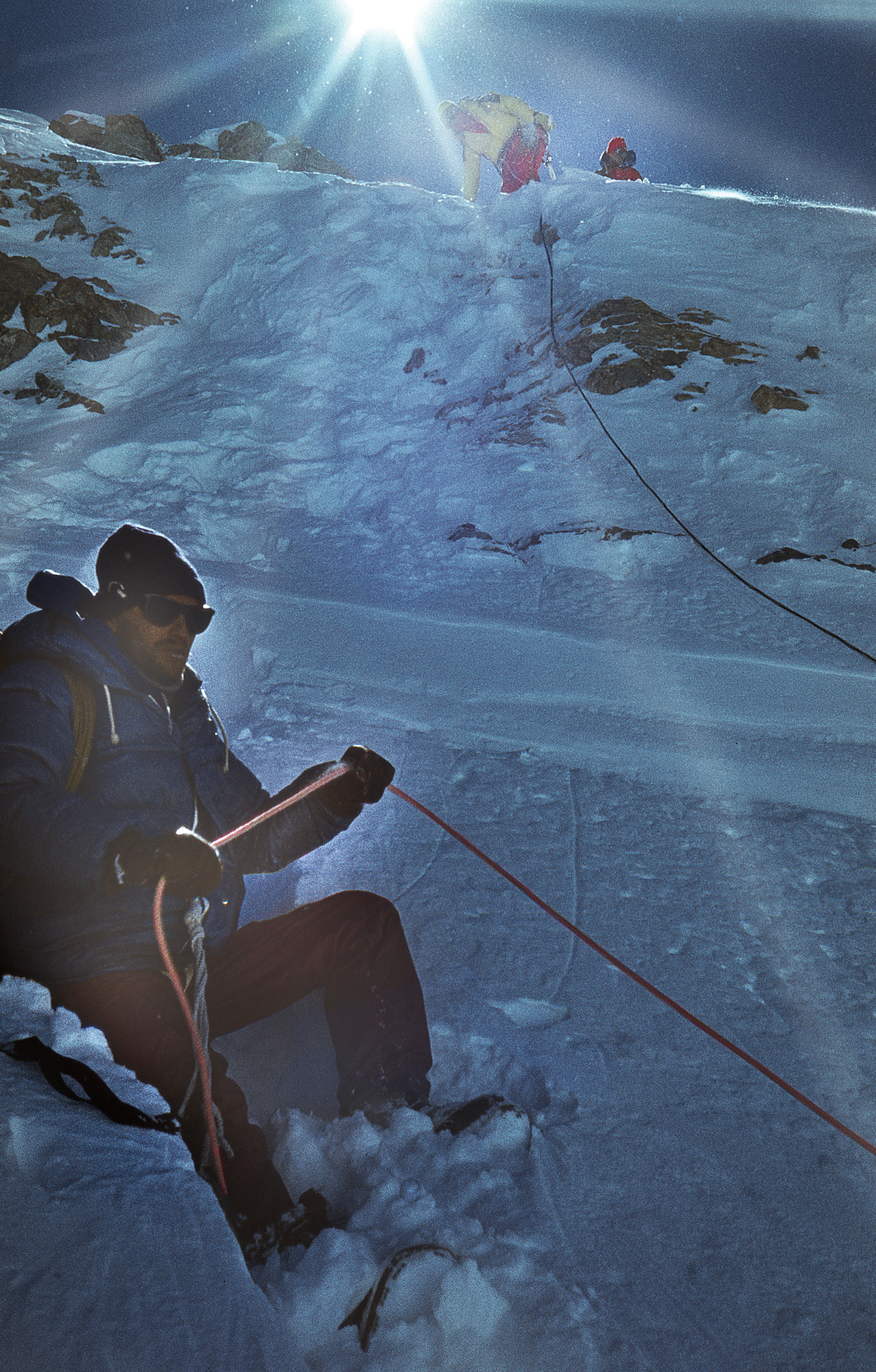 Läti alpinist Pēteris Kūlis.